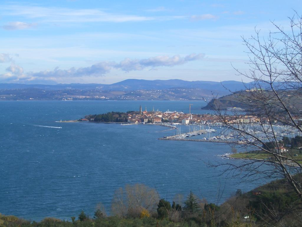 Izola in Slowenien